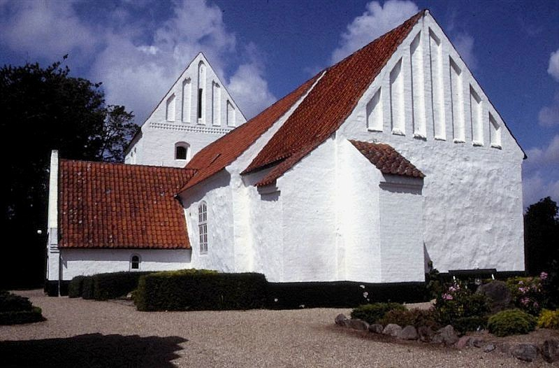 Langå Kirke i Danmark. Langå kirke